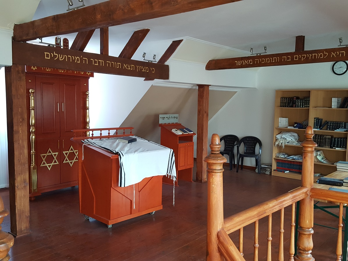 Gebetsraum des Jüdischen Gemeindehauses Brandenburg in der Großen Münzenstraße